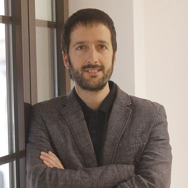 Juan Manuel Del Olmo, político español de Podemos.